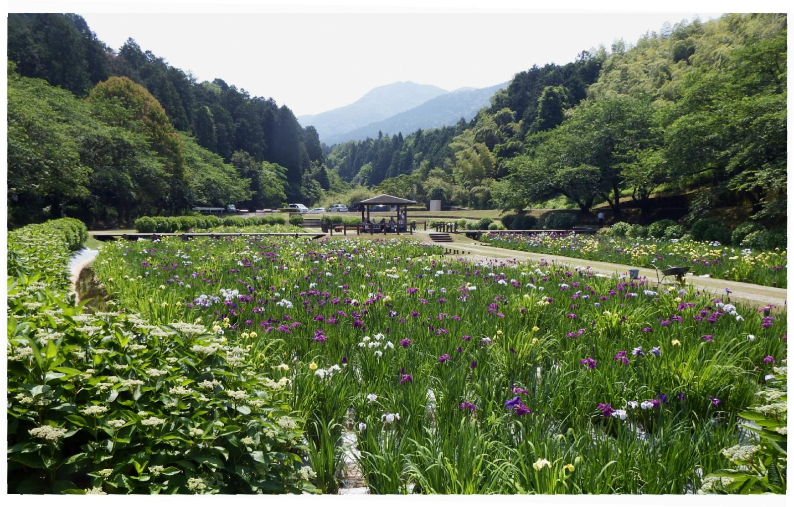 池田池の菖蒲園